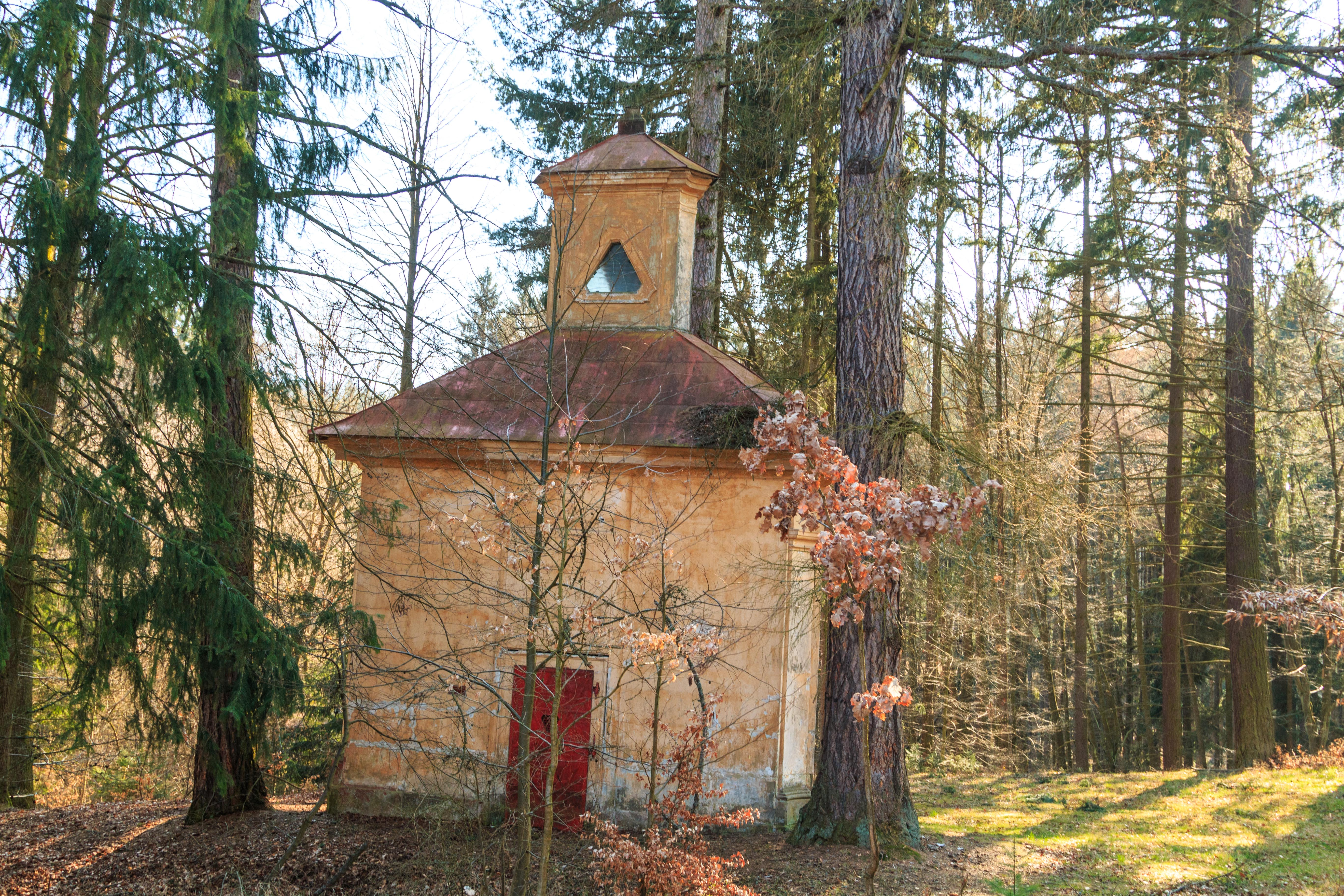 Kaple Nejsvětější Trojice u Ostružna